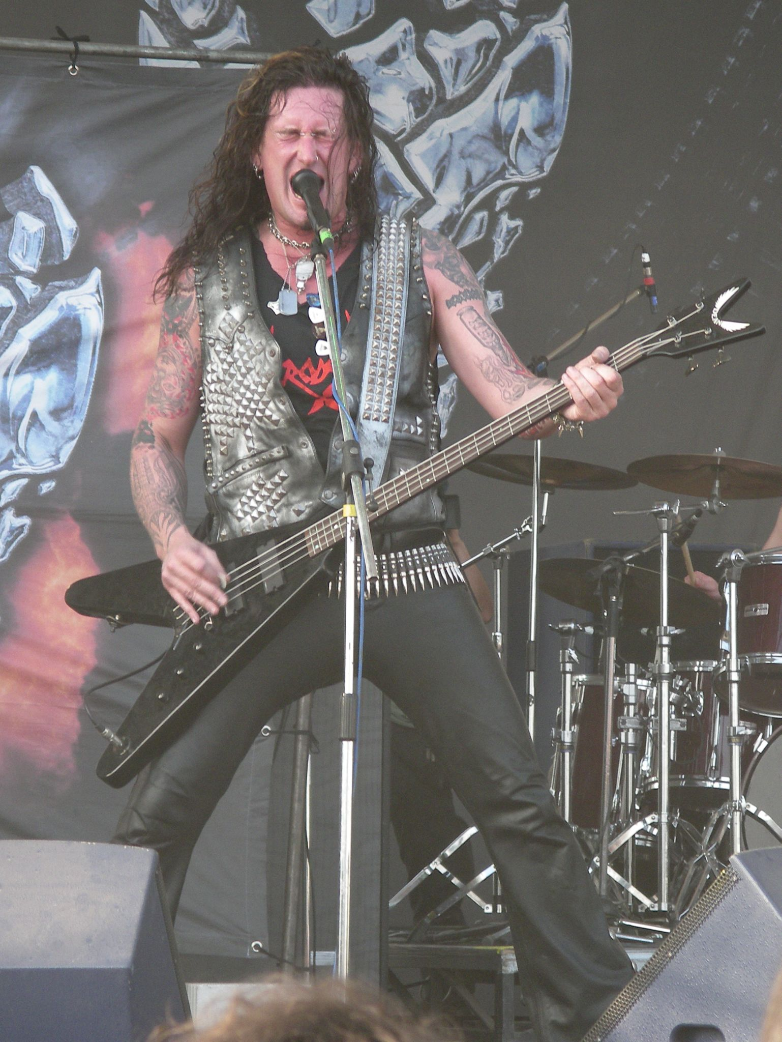 Schmier, bajista y vocalista de Destruction, actuando en el Tradate Iron Fest de 2005.